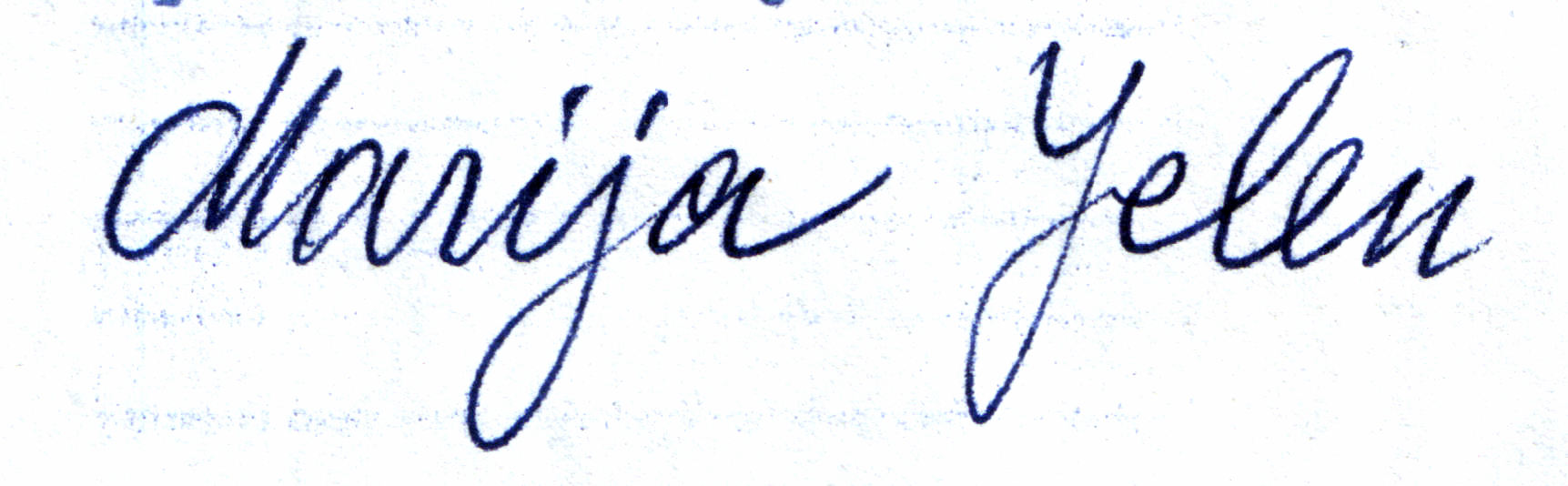 Signature of Marija Brenčič-Jelen in the end of her typed letter from Šentilj pri Velenju to son Janez Jelen in Mužlja